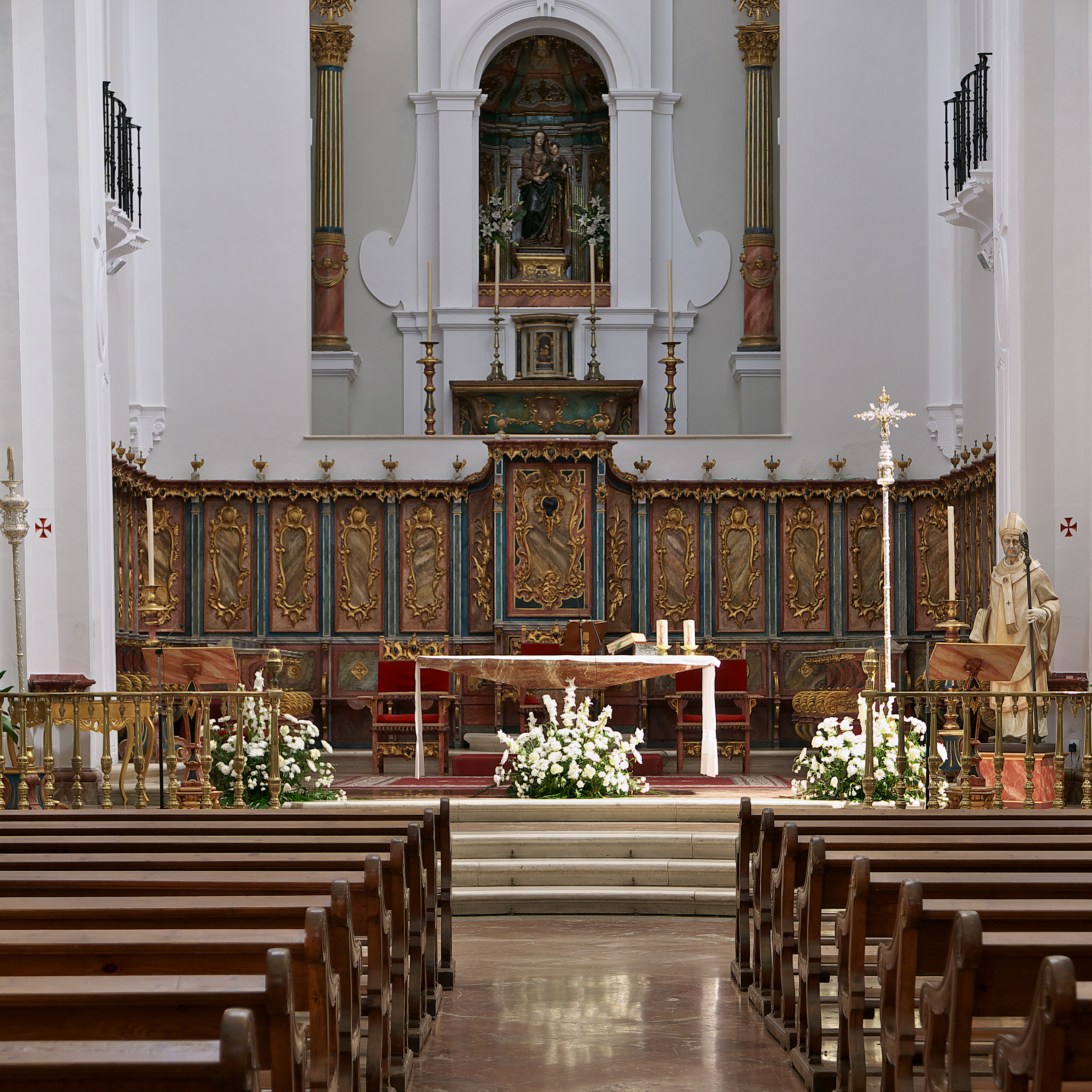 Altar mayor de la Iglesia de la Merced